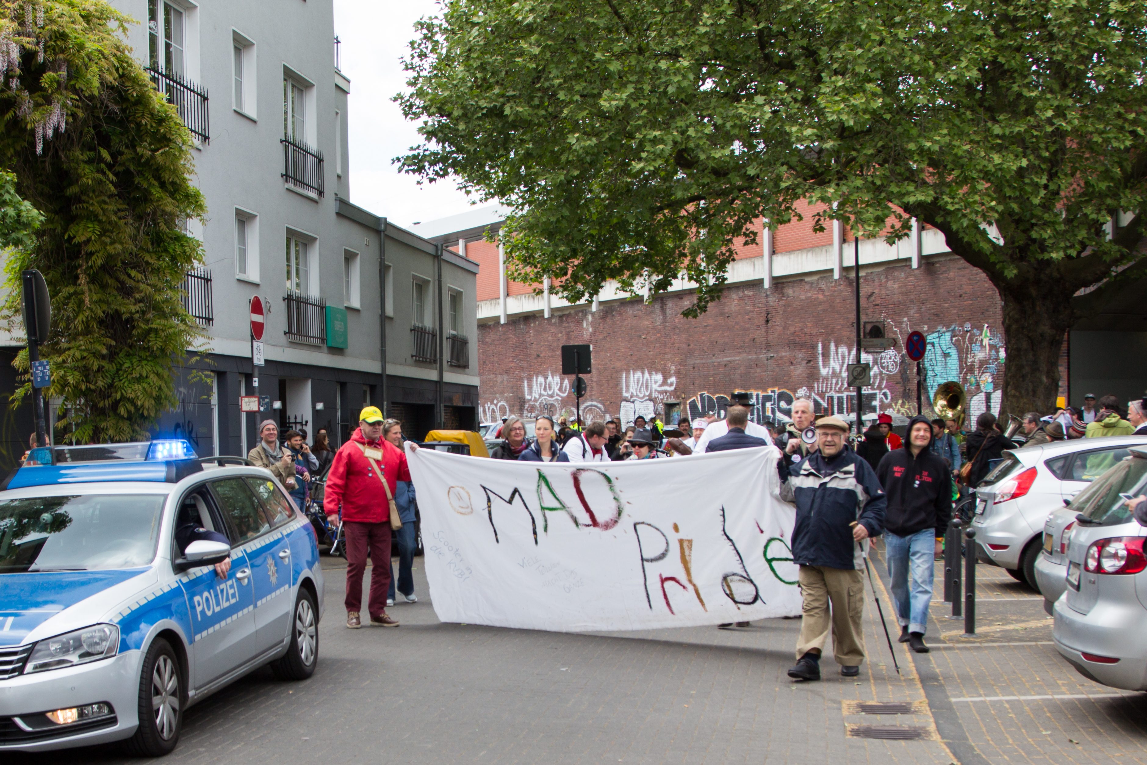 Mad Pride in Köln 2016